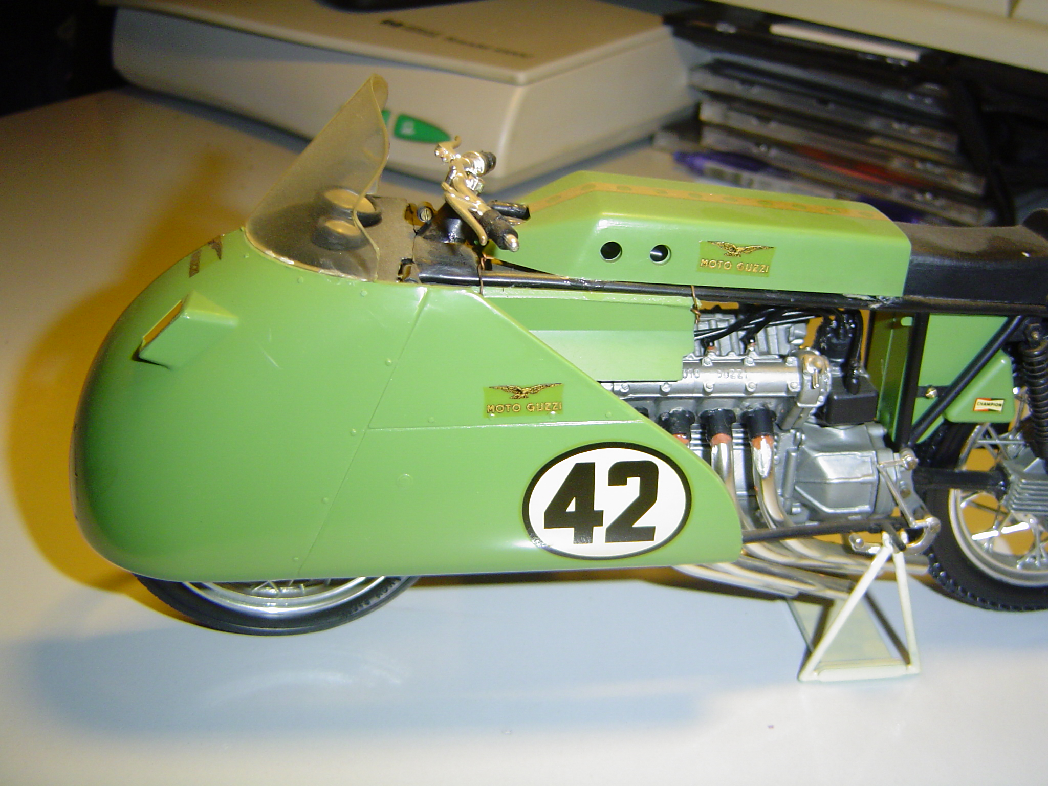 Maquette de Moto Guzzi Quattrocilindri